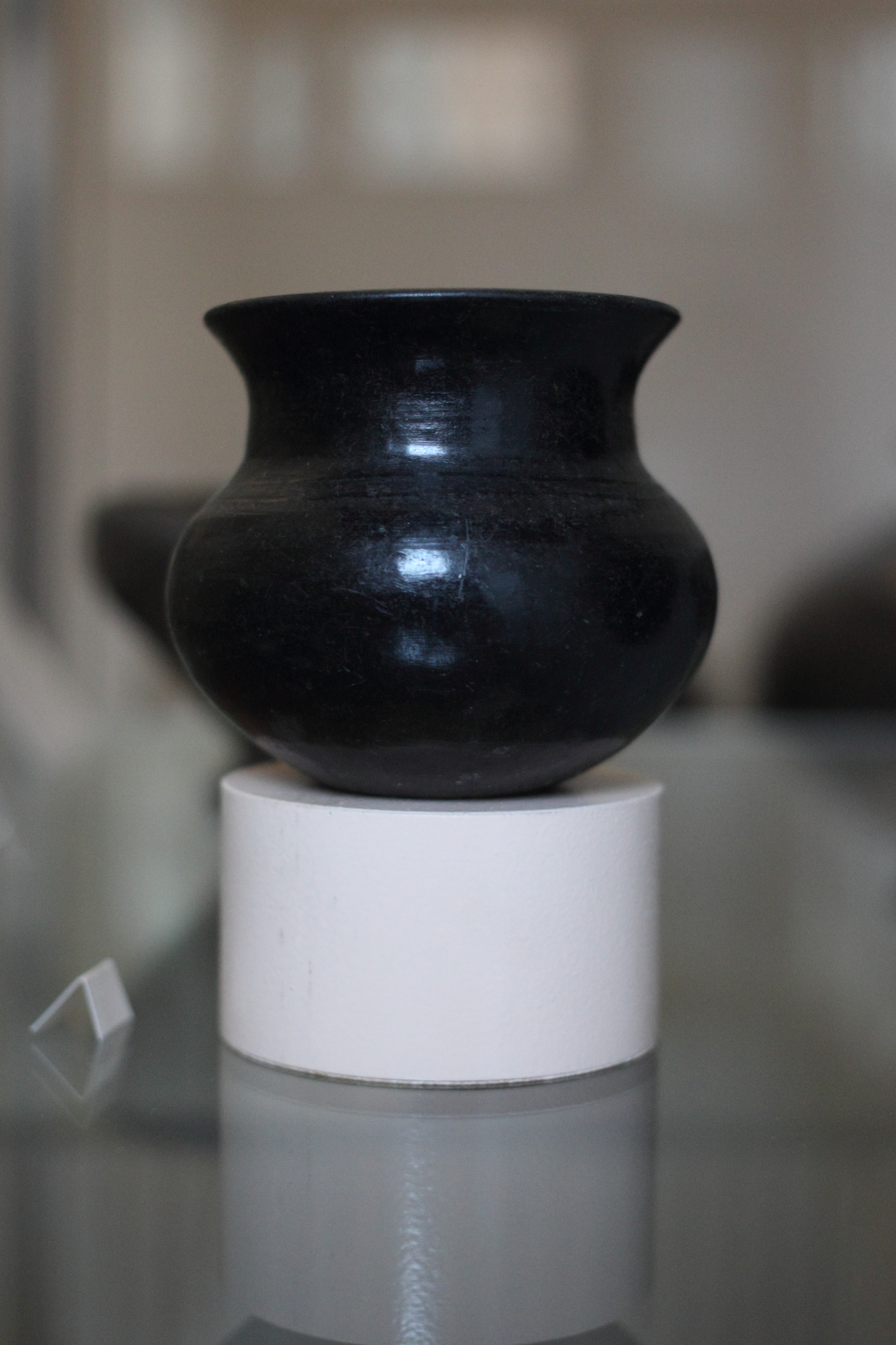 Edit-a-thon al Museo etnografico di Oleggio